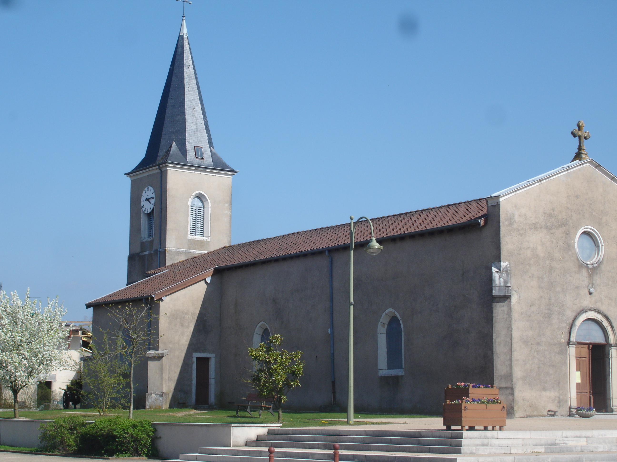 Etrez (Ain) : L'église du village